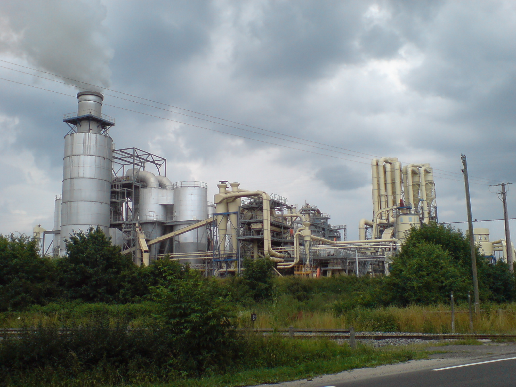 Il s'agit d'un bâtiment industriel appartenant anciennement à Isoroy, à Lure. Site Ikea depuis 2015.